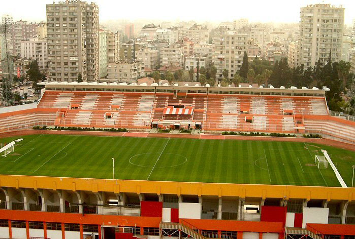 Gençlik Stadı